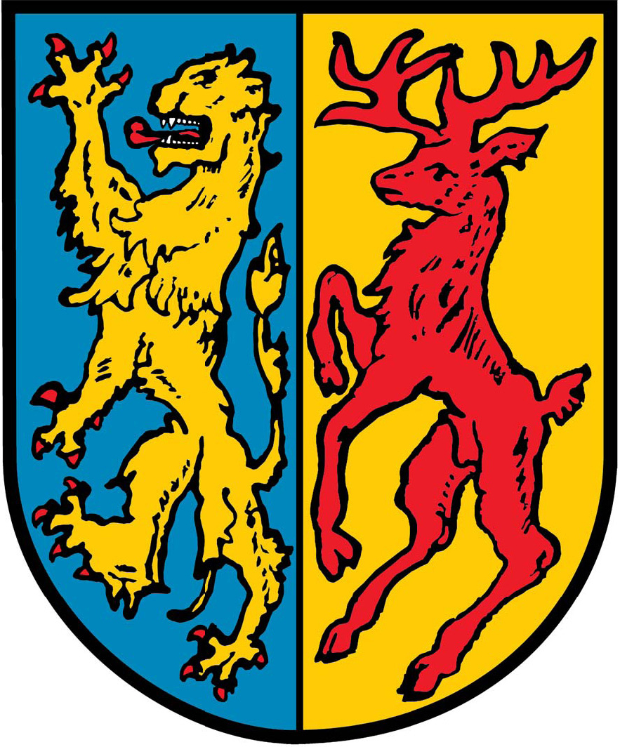 Offizielles Wappen der Stadt Herzberg am Harz